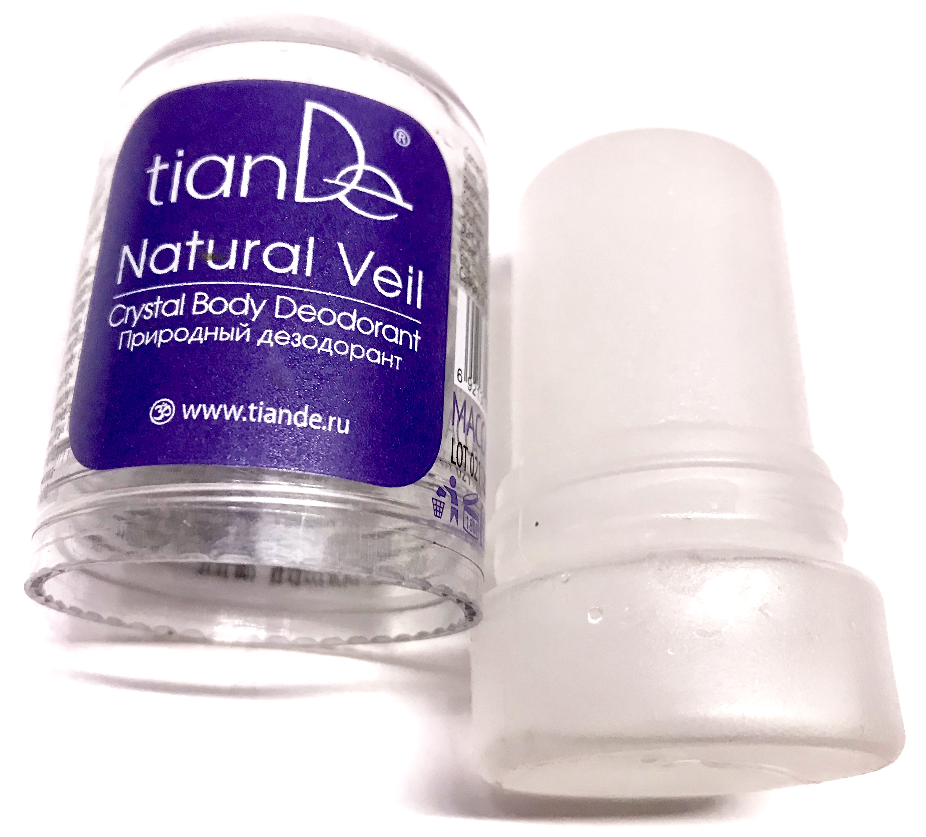 alunit - přírodní krystal s dezinfekčními a protizánětlivými účinky